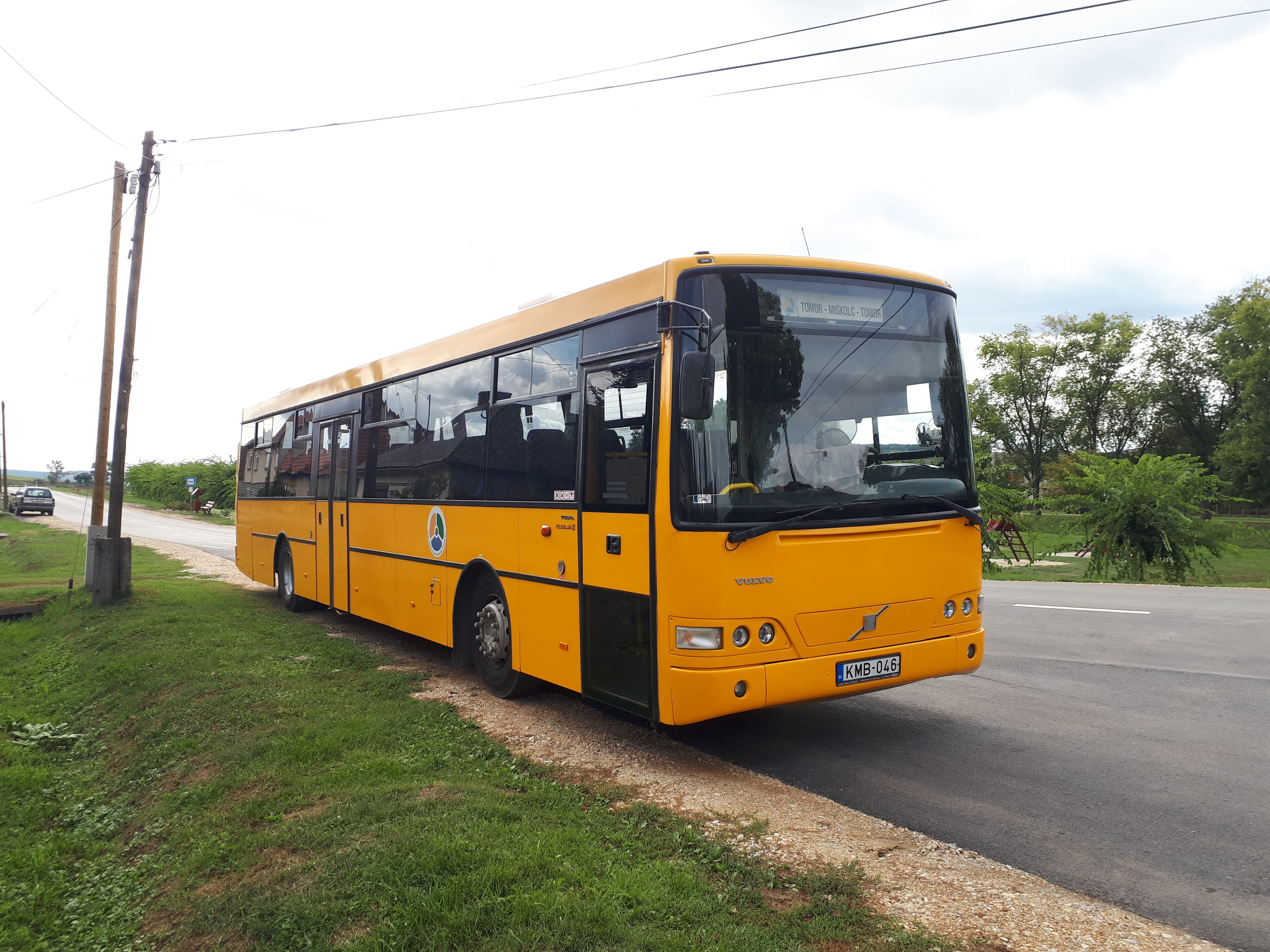 Az ÉMKK KMB-046 rendszámú Volvo Alfa Regio típusú busza Tomoron, a 3717-es helyközi járaton.